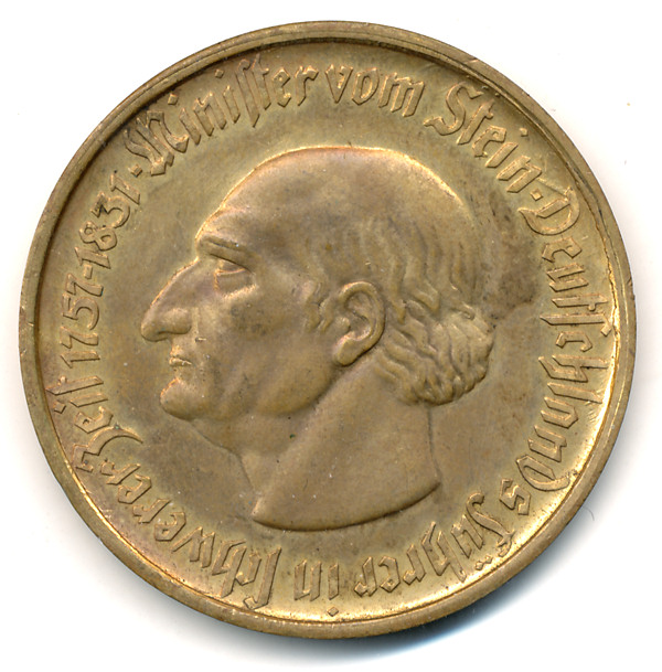 Monnaie émise pendant la période d'inflation par l'état de Westphalie en 1923